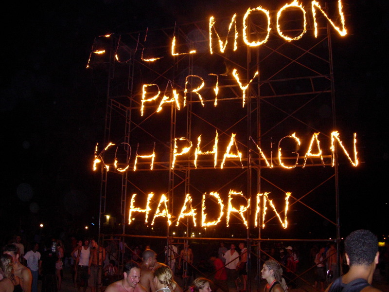 Full moon part haadrin june 2005